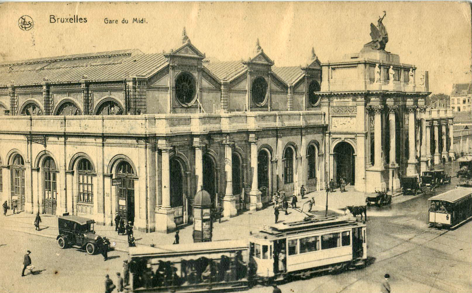 Carte postale ancienne éditée par Nels : Bruxelles - Gare du Midi